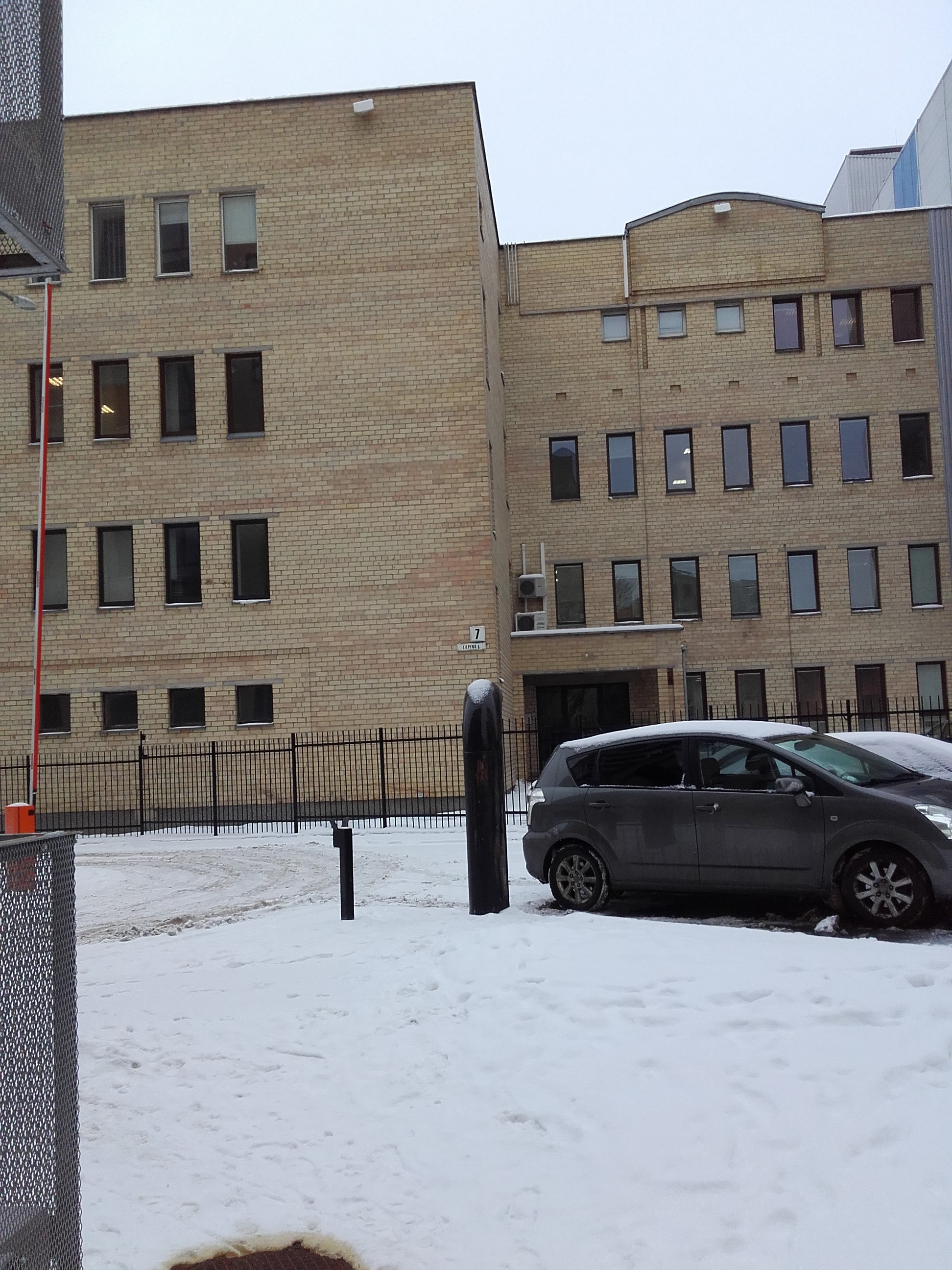 Tardymo departamentas